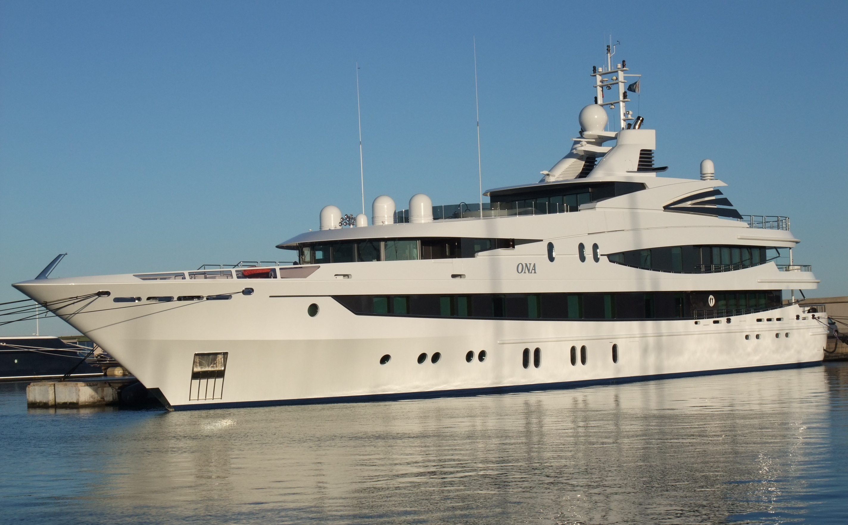 Vue d'ensemble du yacht.